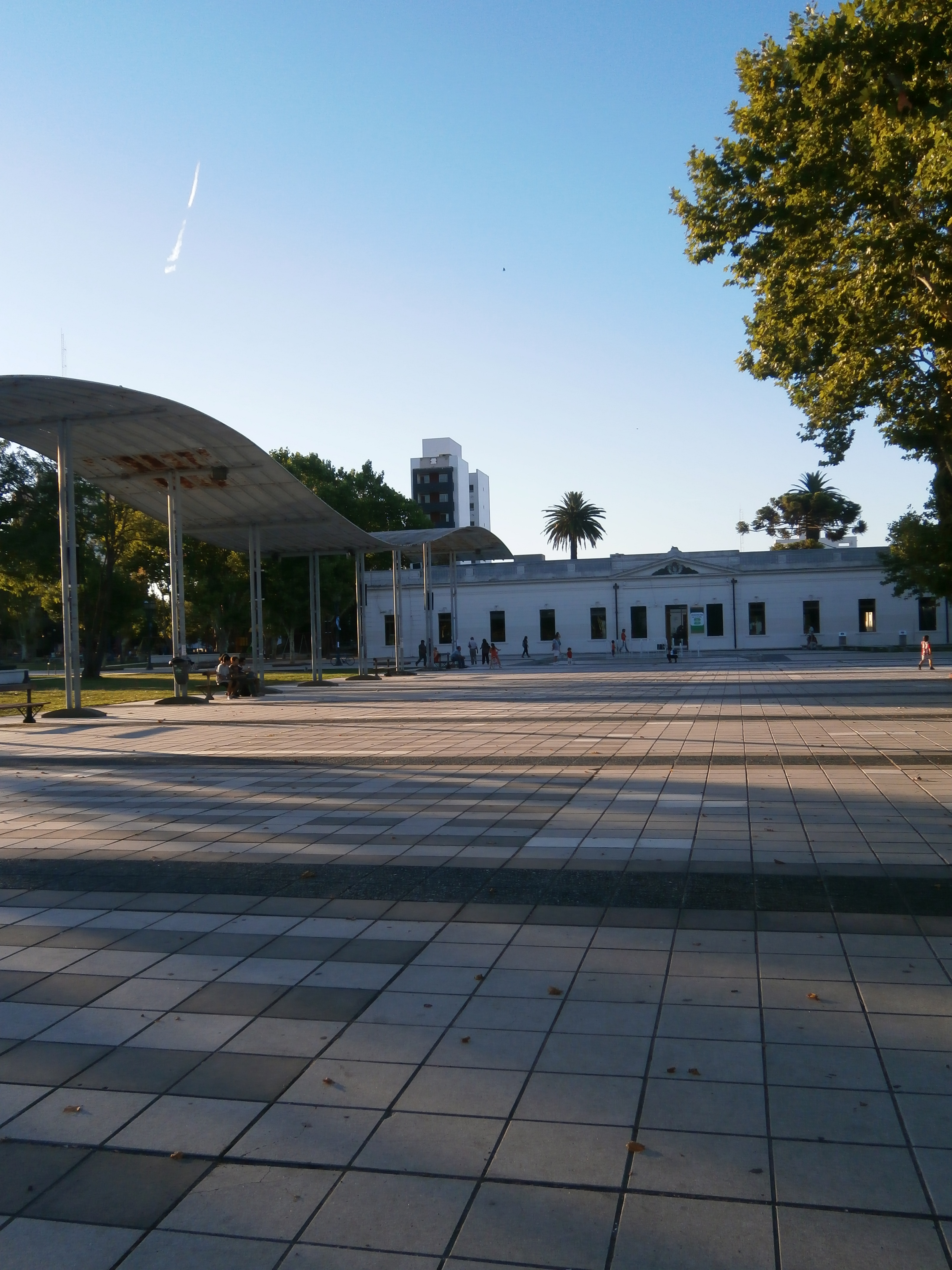 Plaza Islas Malvinas y Centro Cultural Islas Malvinas al fondo. La Plata, Argentina.